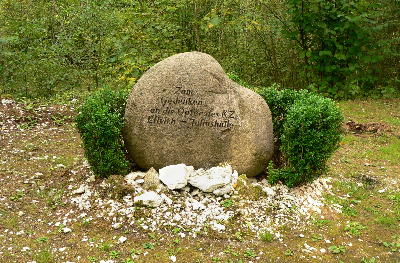 KZ-Außenlager Ellrich-Juliushütte, Gedenkstein am früheren Krematorium